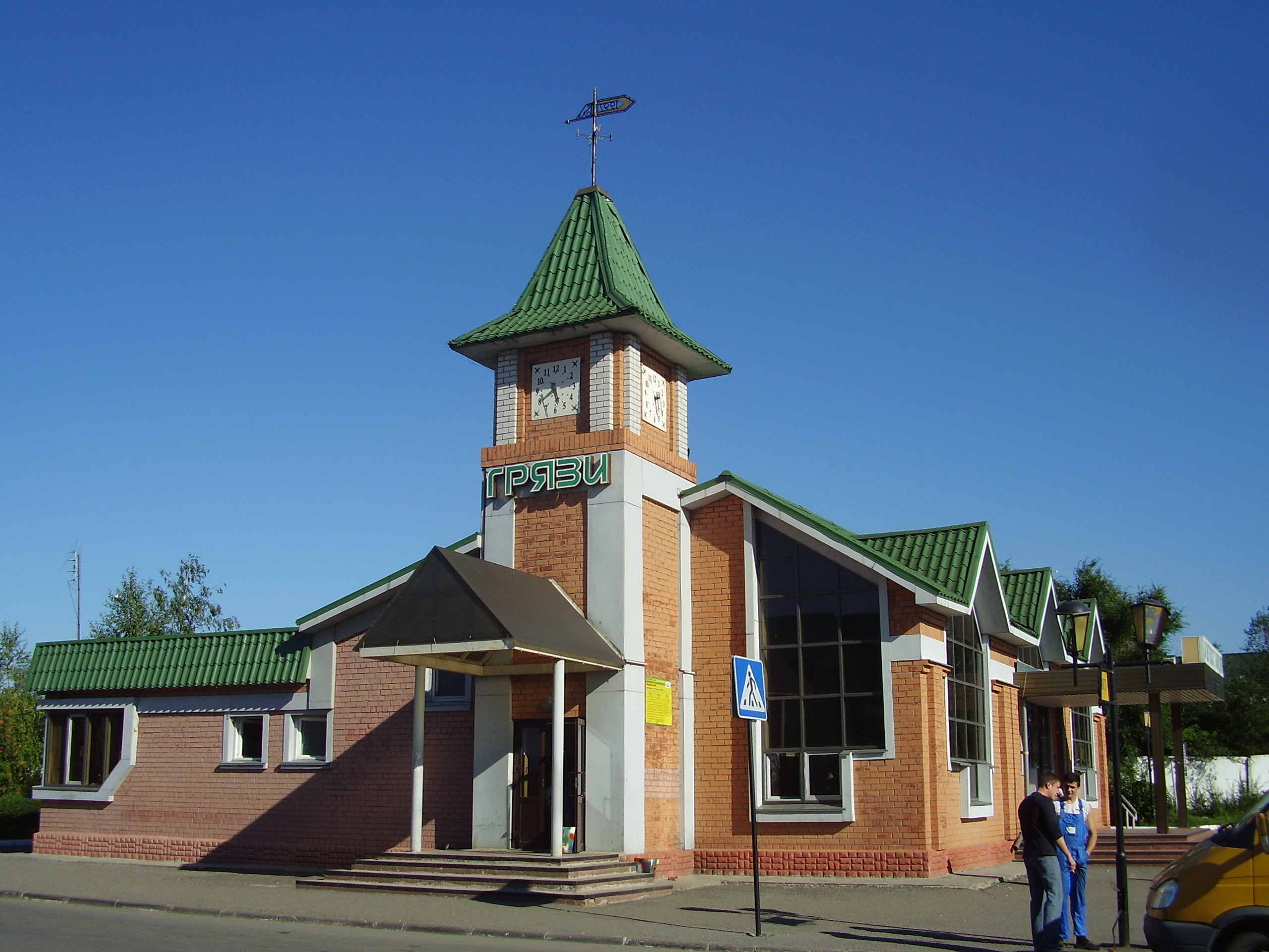 г.Грязи,автостанция